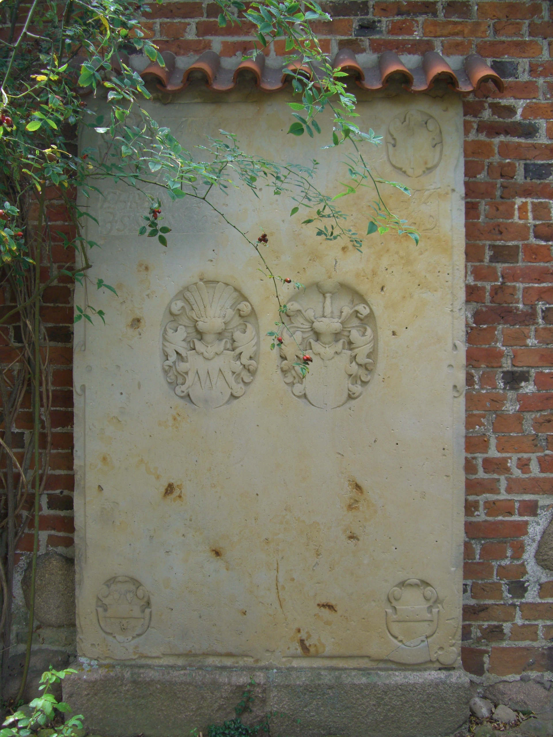 Graffsteen an de Kark vun Öös.